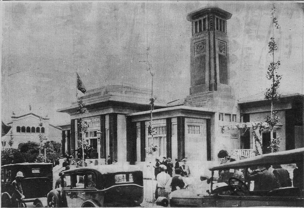 Pavelló de la Companyia de Tabacs de Filipines fou obra d'Antoni Darder fet el 1929 per a l'Exposició Universal de Barcelona-1929 (Catalunya).